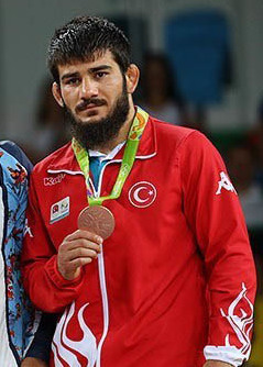 مدال‌آوران مسابقات کشتی آزاد المپیک ریو دو ژانیرو در وزن 74 کیلوگرام.